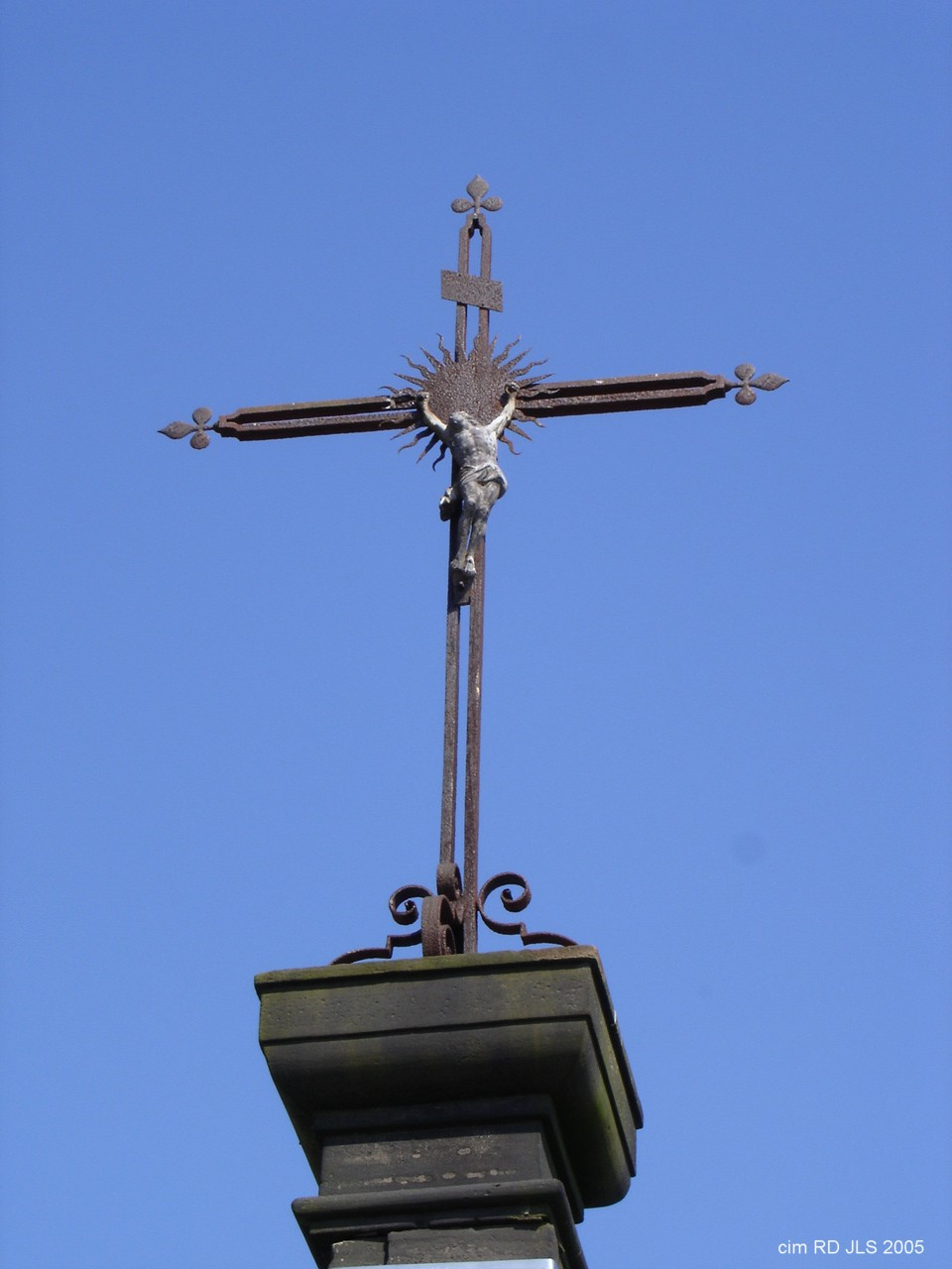 Croix métallique sommitale de la croix centrale du cimetière (XIX°s.) de la Haute Chapelle à Raon-l'Étape 88372